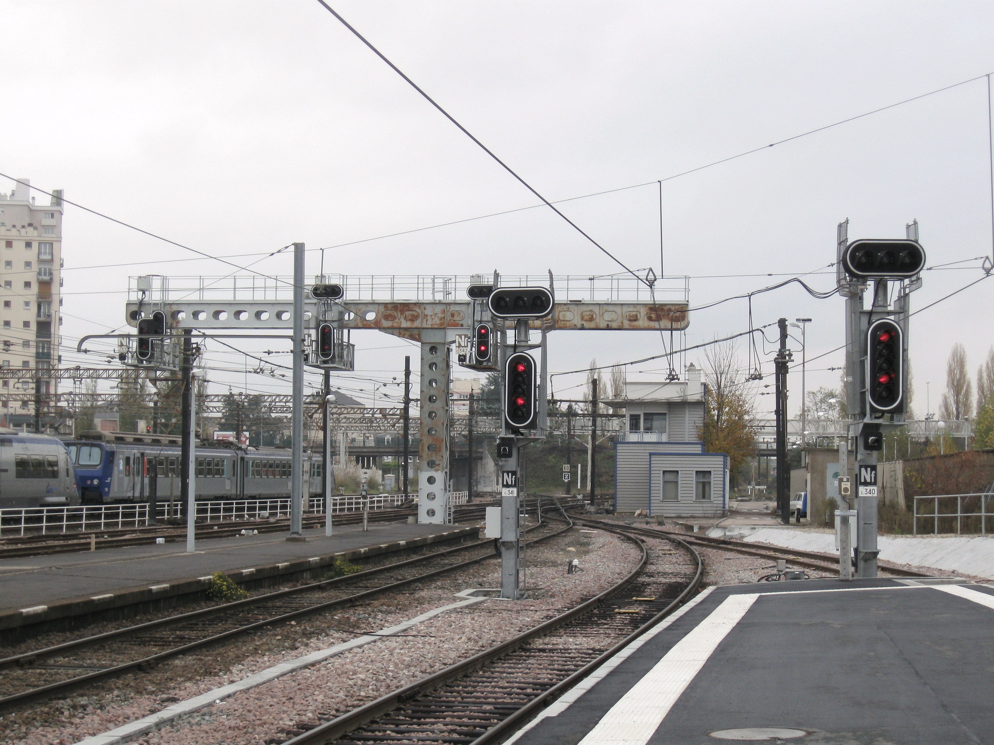 Gare d'Orléans : les voies en direction de Tours (à gauche), Les Aubrais et Paris (au centre) et Vierzon (à droite), Orléans, Loiret, France